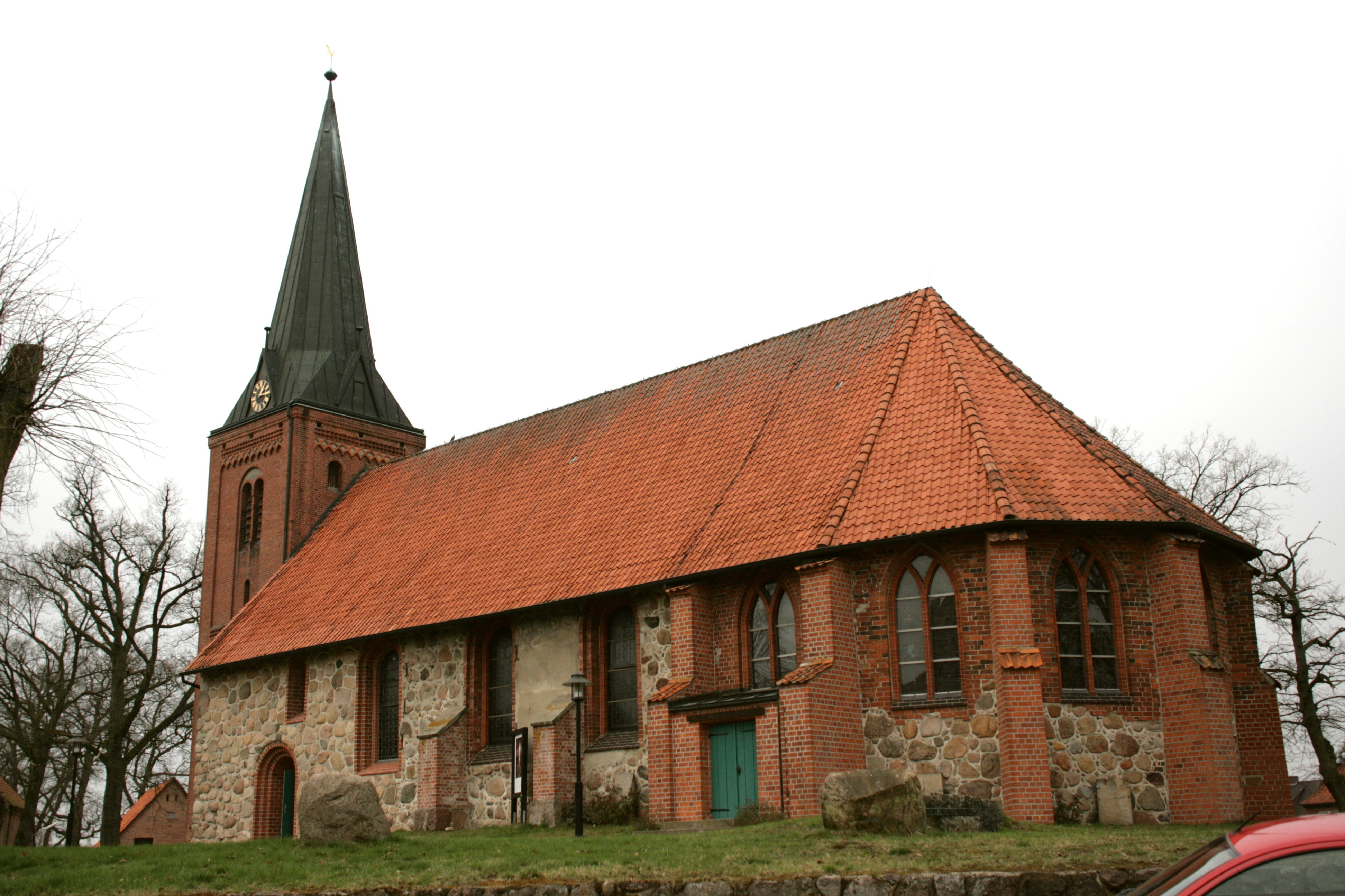 St. Georg, Wriedeler Straße im Ortsteil Hanstedt I von Hanstedt (Landkreis Uelzen)